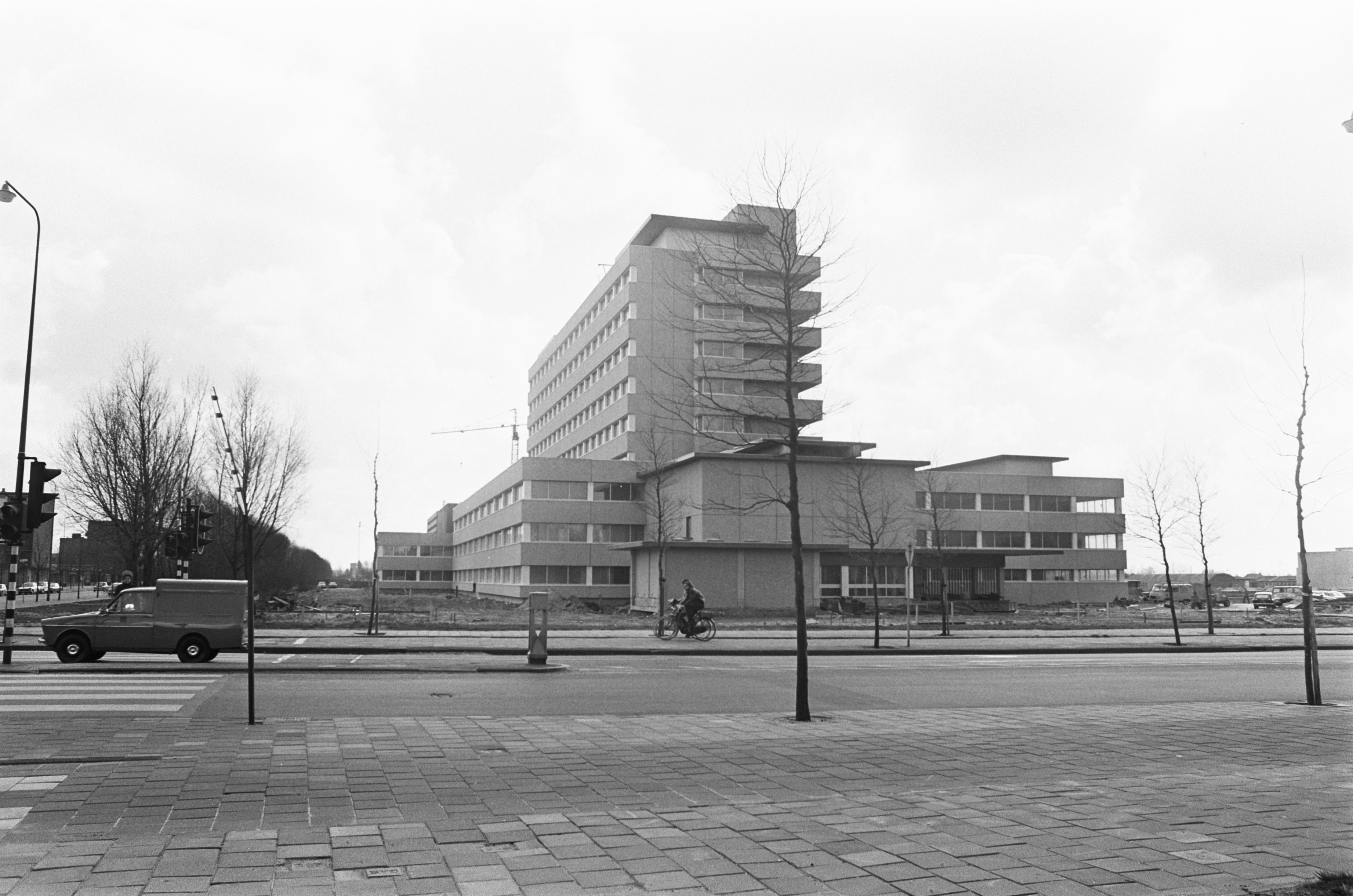 Collectie / Archief : Fotocollectie Anefo Reportage / Serie : [ onbekend ] Beschrijving : Nieuw Anthonie van Leeuwenhoekziekenhuis in Amsterdam, exterieur Datum : 10 april 1973 Locatie : Amsterdam, Noord-Holland Trefwoorden : ziekenhuizen Fotograaf : Punt, […] / Anefo Auteursrechthebbende : Nationaal Archief Materiaalsoort : Negatief (zwart/wit) Nummer archiefinventaris : bekijk toegang 2.24.01.05 Bestanddeelnummer : 926-3356